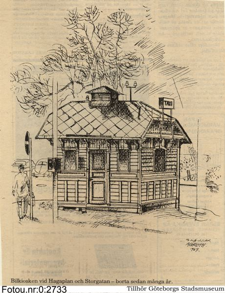 Taxistation vid Haga Kyrkoplan–Storgatan i Göteborg. Teckning av Stig-Allan Agroth 1967.